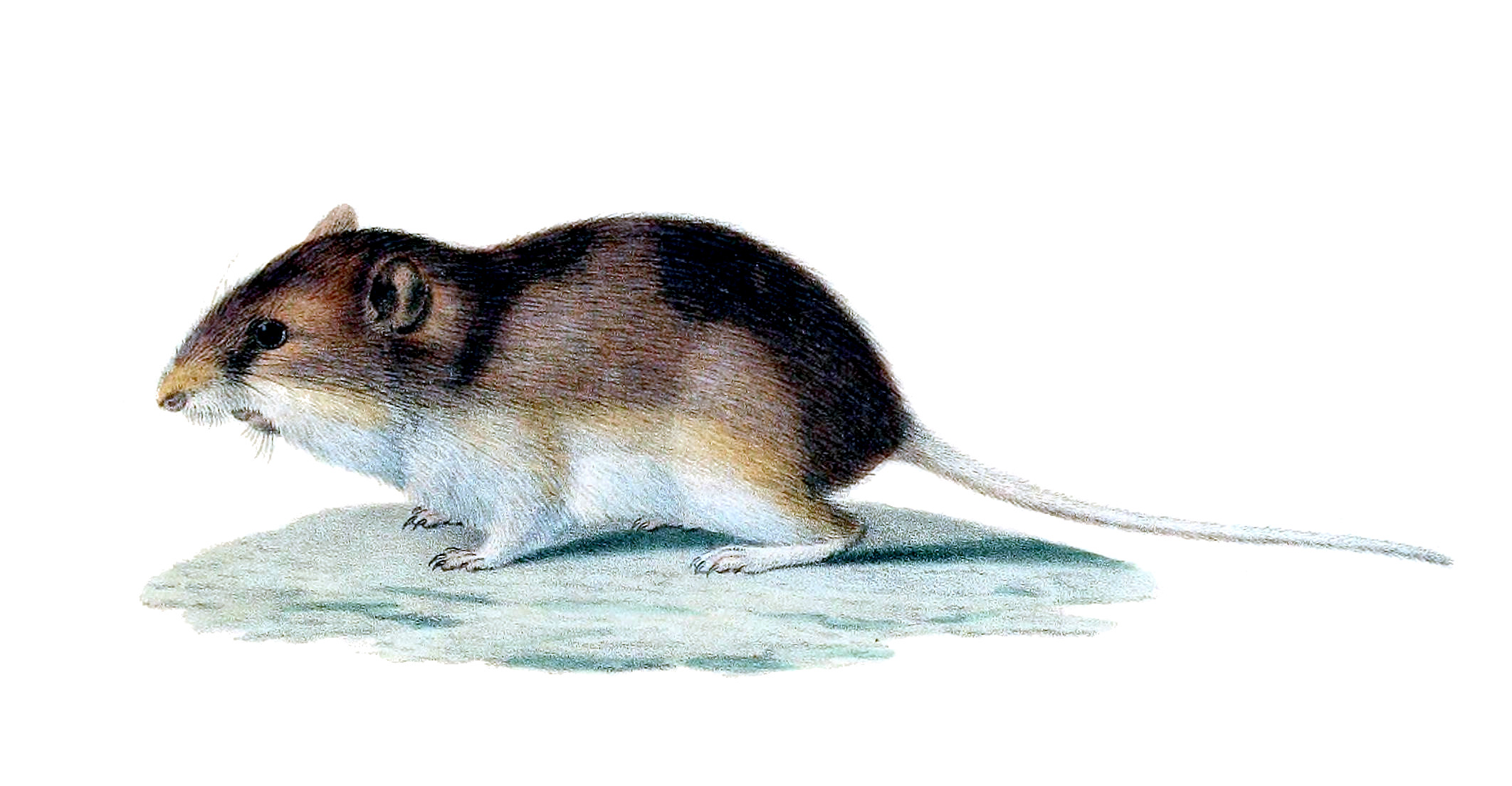 Оливковый мешотчатый прыгун (Perognathus fasciatus)